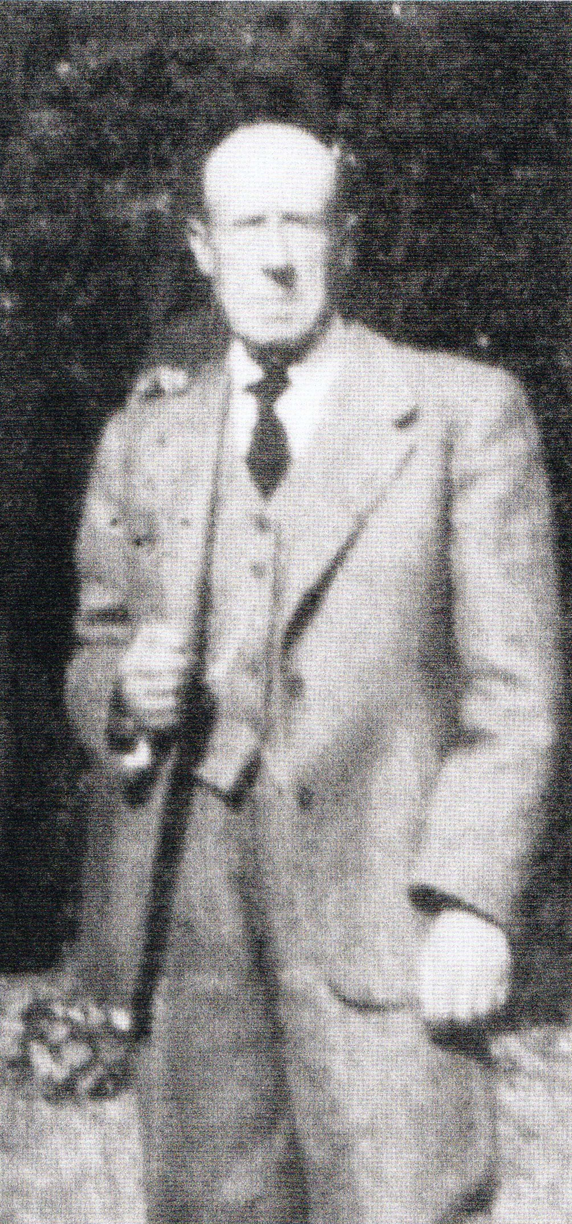 Domenico Giuliotti (1877-1956)